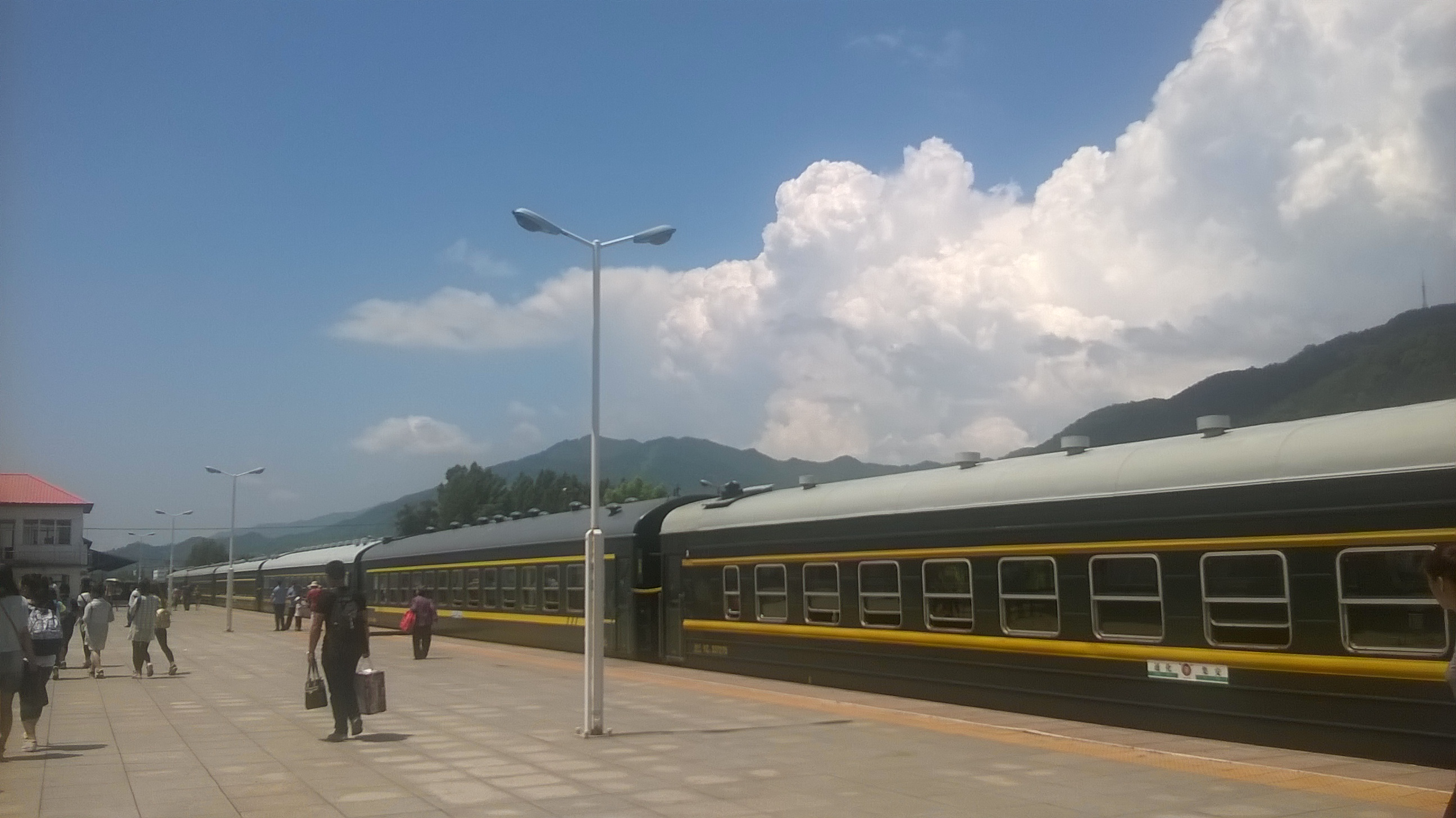 集安火车站站台